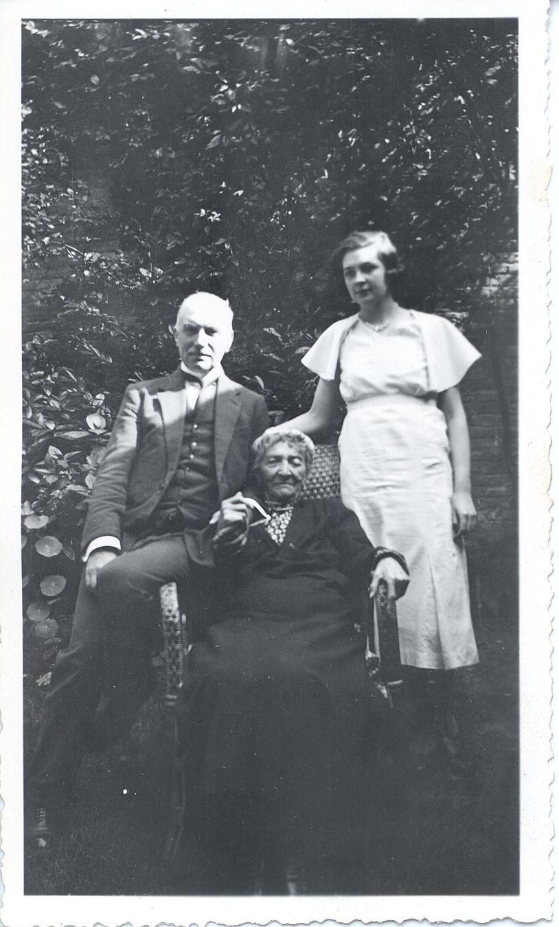 La générale Rouen, née José STRAATMAN, avec son neveu Gabriel van Dievoet, et sa petite nièce Andrée Gachassin Lafite, vers 1921. Joséphine (José) Pétronelle STRAATMAN, née le 15 avril 1842, épousa à Bruxelles le 30 avril 1862 Charles Auguste Jean Baptiste ROUEN, lieutenant-général des grenadiers et historien militaire, né à Anvers le 9 juillet 1838, auteur d’un livre réputé: L’Armée Belge. Exposé historique de son organisation, de ses costumes et uniformes, de son armement et de sa tactique depuis les temps primitifs jusqu’à nos jours, Bruxelles, Lyon-Claesen, 1896, fils de Guillaume Rouen, capitaine au 6ème régiment de ligne, ancien cadet aux hussards de Croy, et d’Henriette Elius.